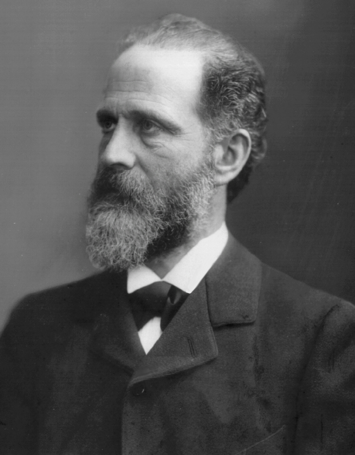 Victor Meyer (* 8. September 1848 in Berlin; † 8. August 1897 in Heidelberg) in Heidelberg